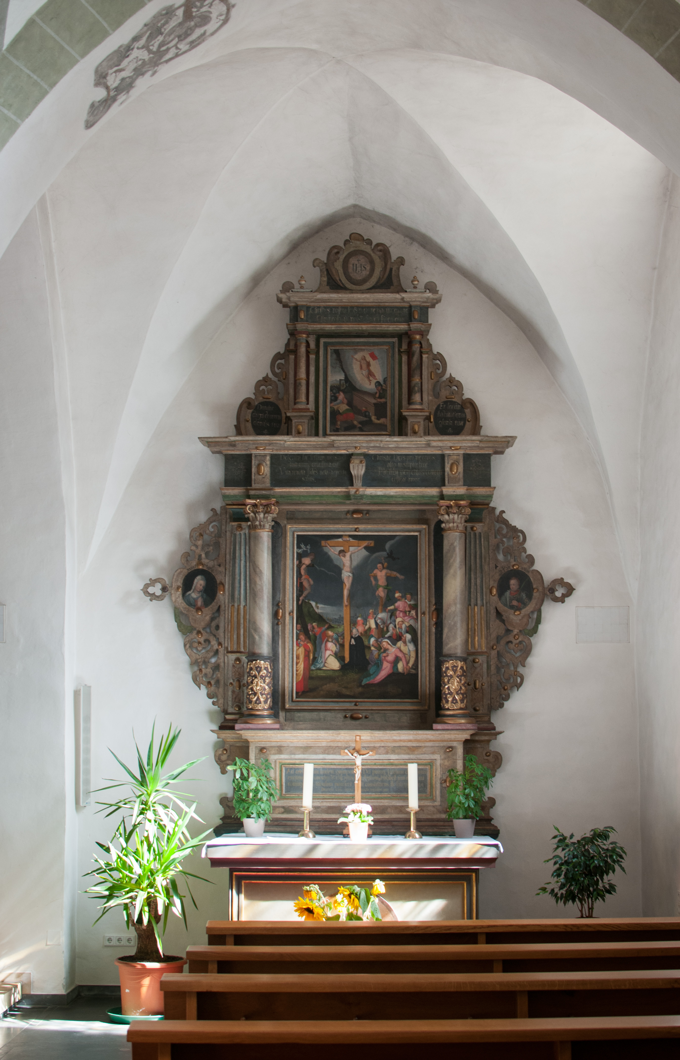 Stockum, Pfarrkirche St. Pankratius, Altar im rechten Seitenschiff